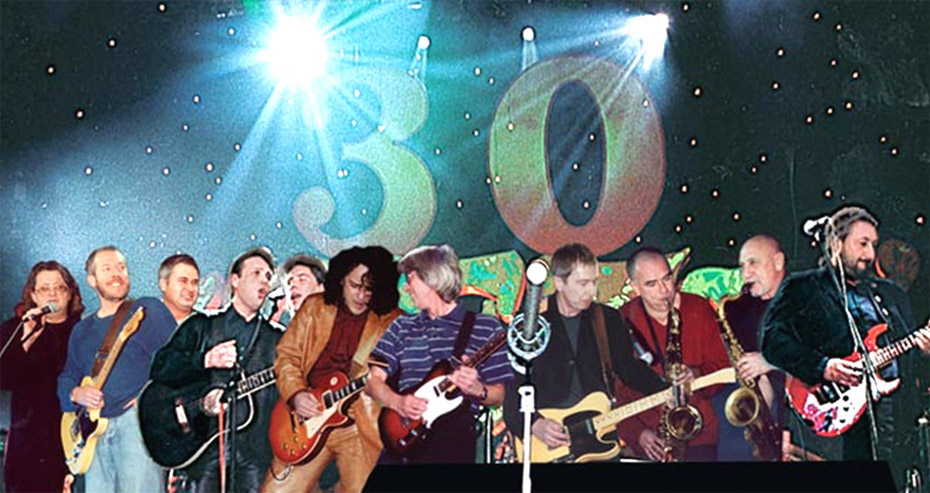 Цветы, 2001. Юбилейный концерт – 30. Джем-сейшн